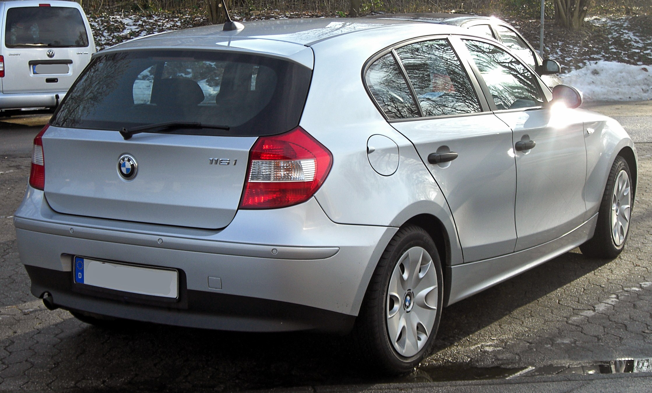 BMW 1er